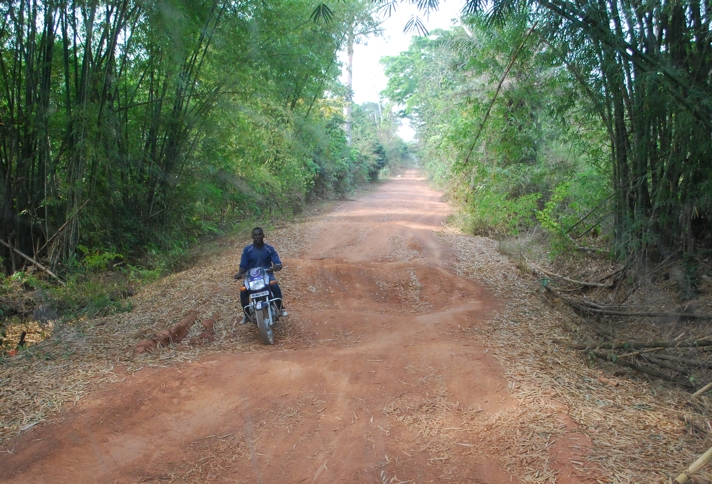 Monrovia, Liberia